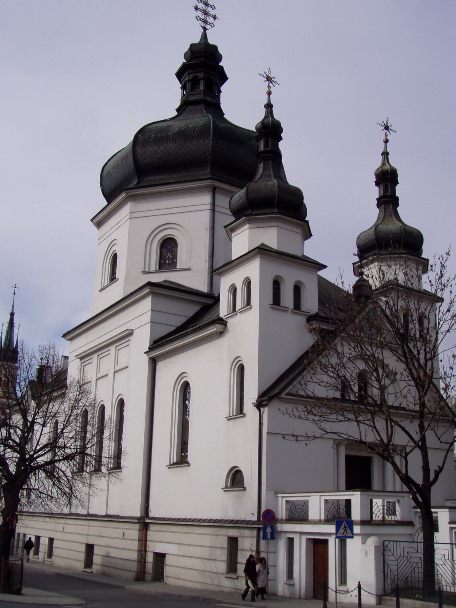 Klasztor Zakonu Bazylianów Świętego Jozafata p.w. Współcierpienia Najświętszej Bogurodzicy w Przemyślu